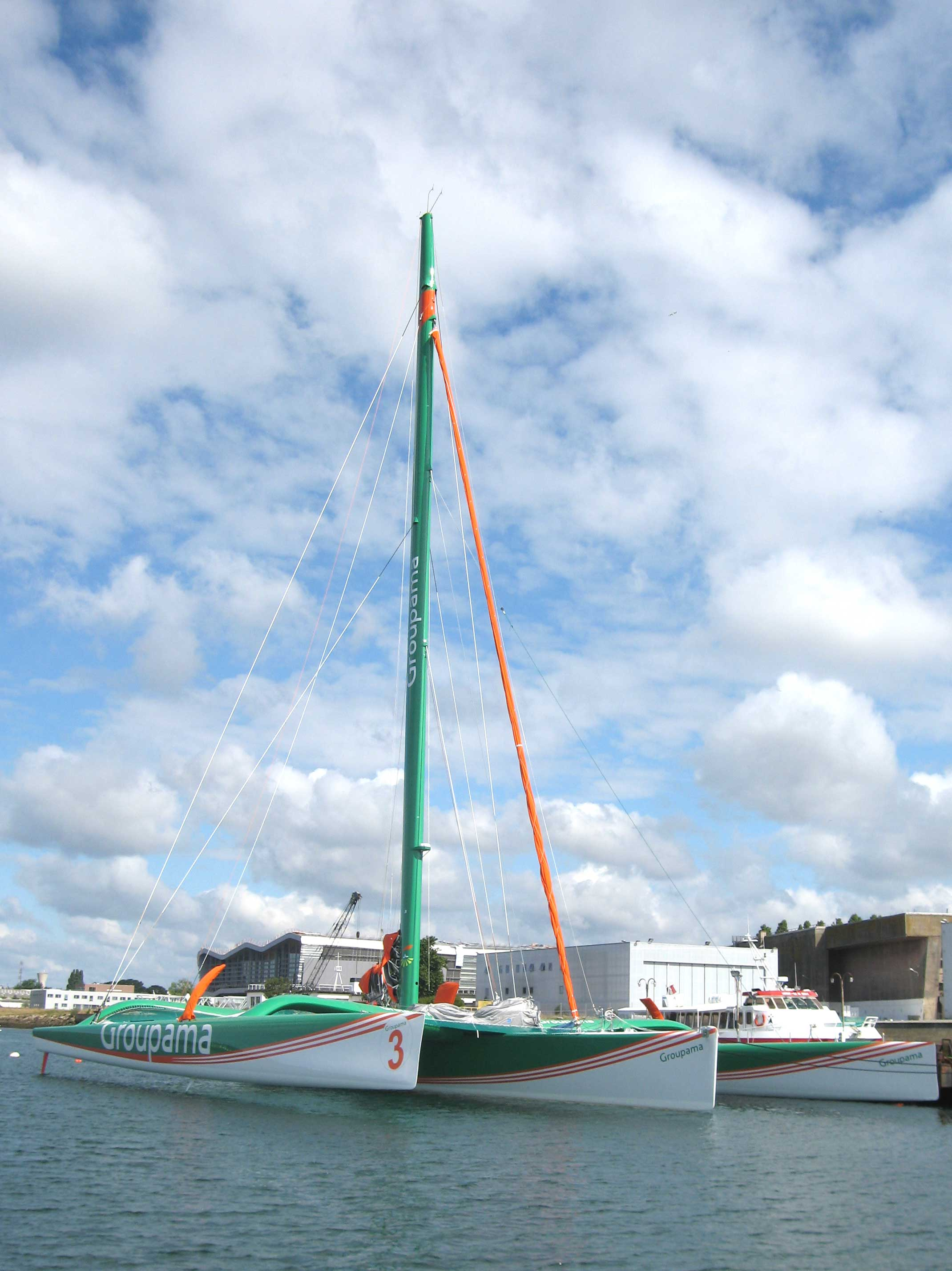 Description : Trimaran Groupama dans le port de Lorient Lieu : Lorient, Bretagne, France Date : 2006 Auteur : Pline